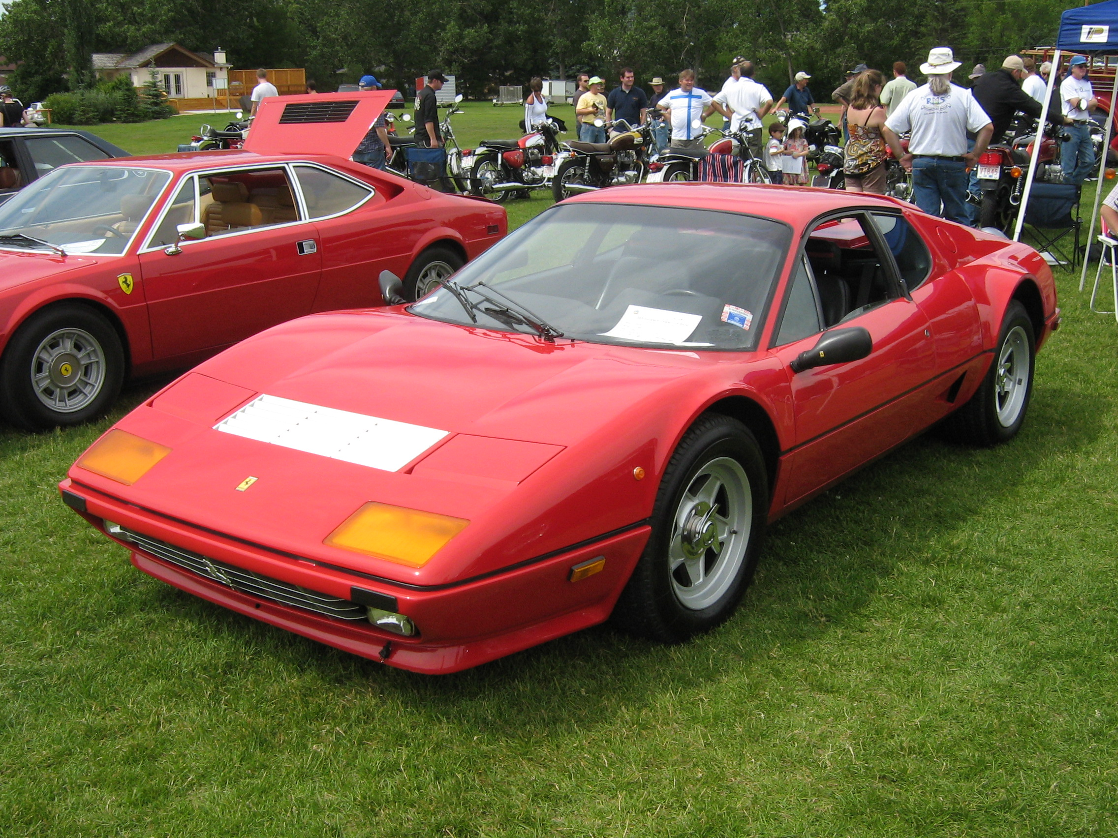 1983 Ferrari 512 BBi